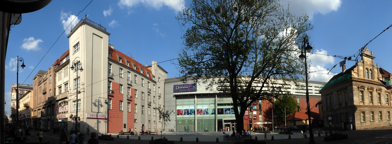 Dom Mody Drukarnia w Bydgoszczy przy ul. Gdańskiej